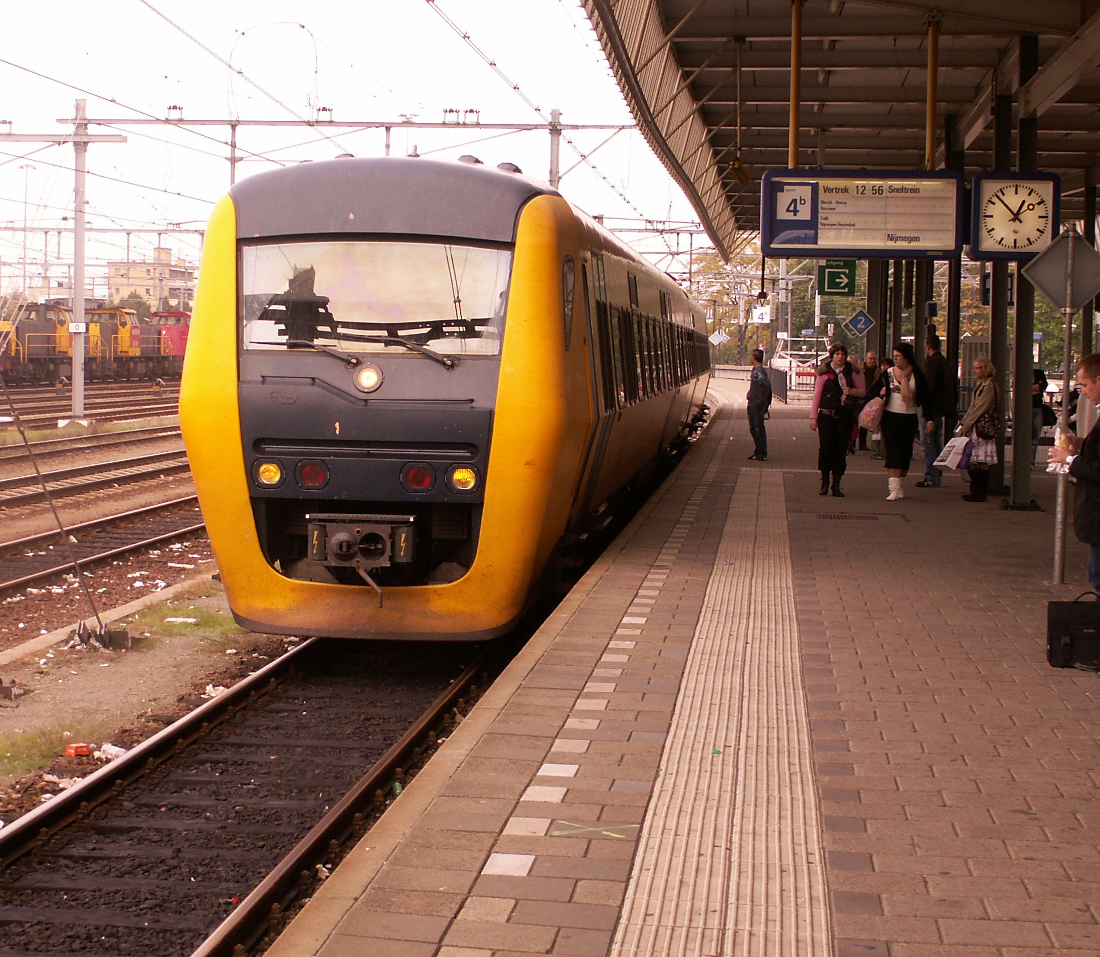 Bf Venlo